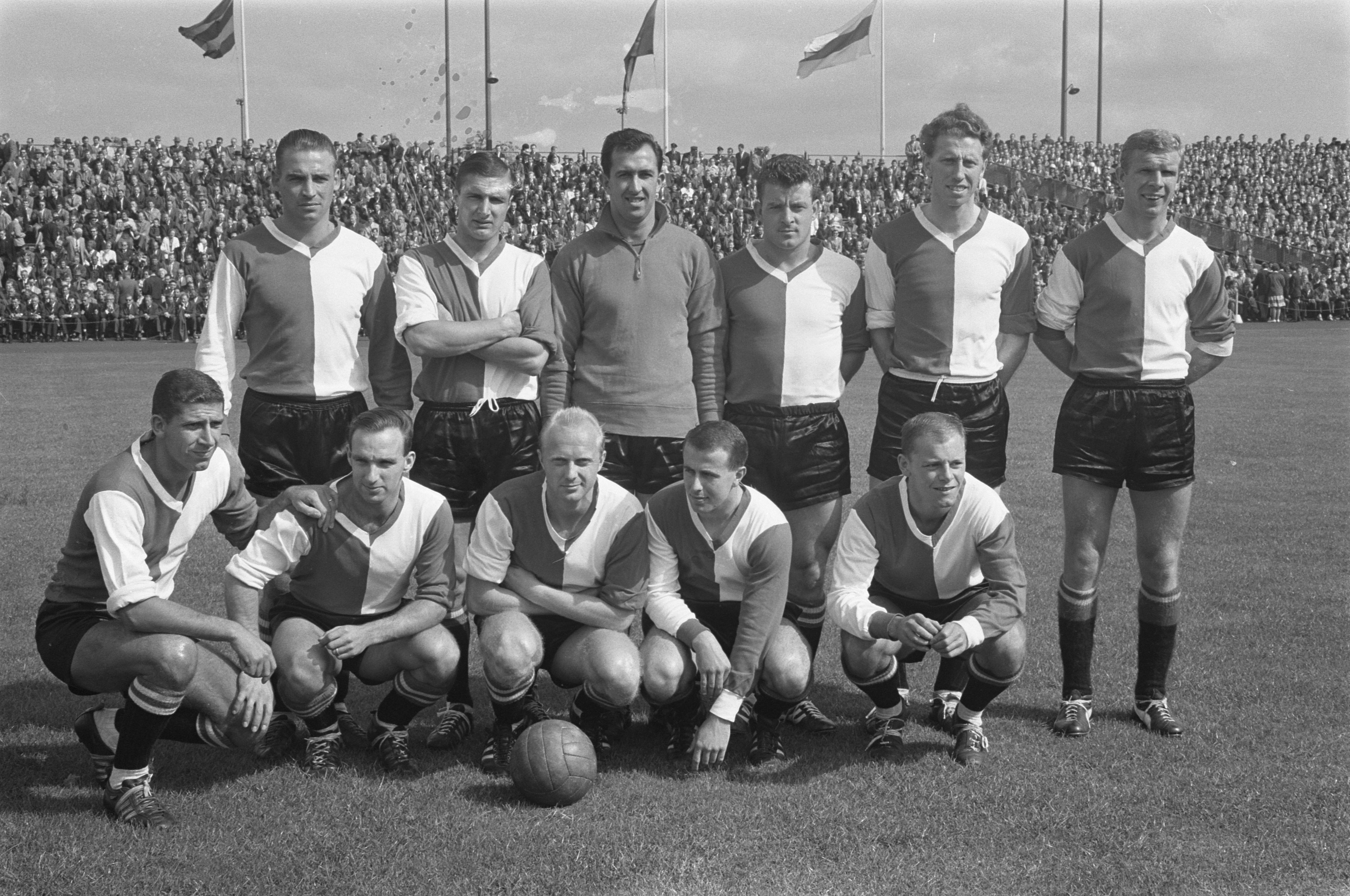 Collectie / Archief : Fotocollectie Anefo Reportage / Serie : [ onbekend ] Beschrijving : Enschede tegen Feyenoord 1-2, elftal Feyenoord Datum : 26 augustus 1962 Locatie : Enschede Trefwoorden : elftallen, sport, voetbal Instellingsnaam : Feyenoord Fotograaf : Pot, Harry / Anefo Auteursrechthebbende : Nationaal Archief Materiaalsoort : Negatief (zwart/wit) Nummer archiefinventaris : bekijk toegang 2.24.01.05 Bestanddeelnummer : 914-2398